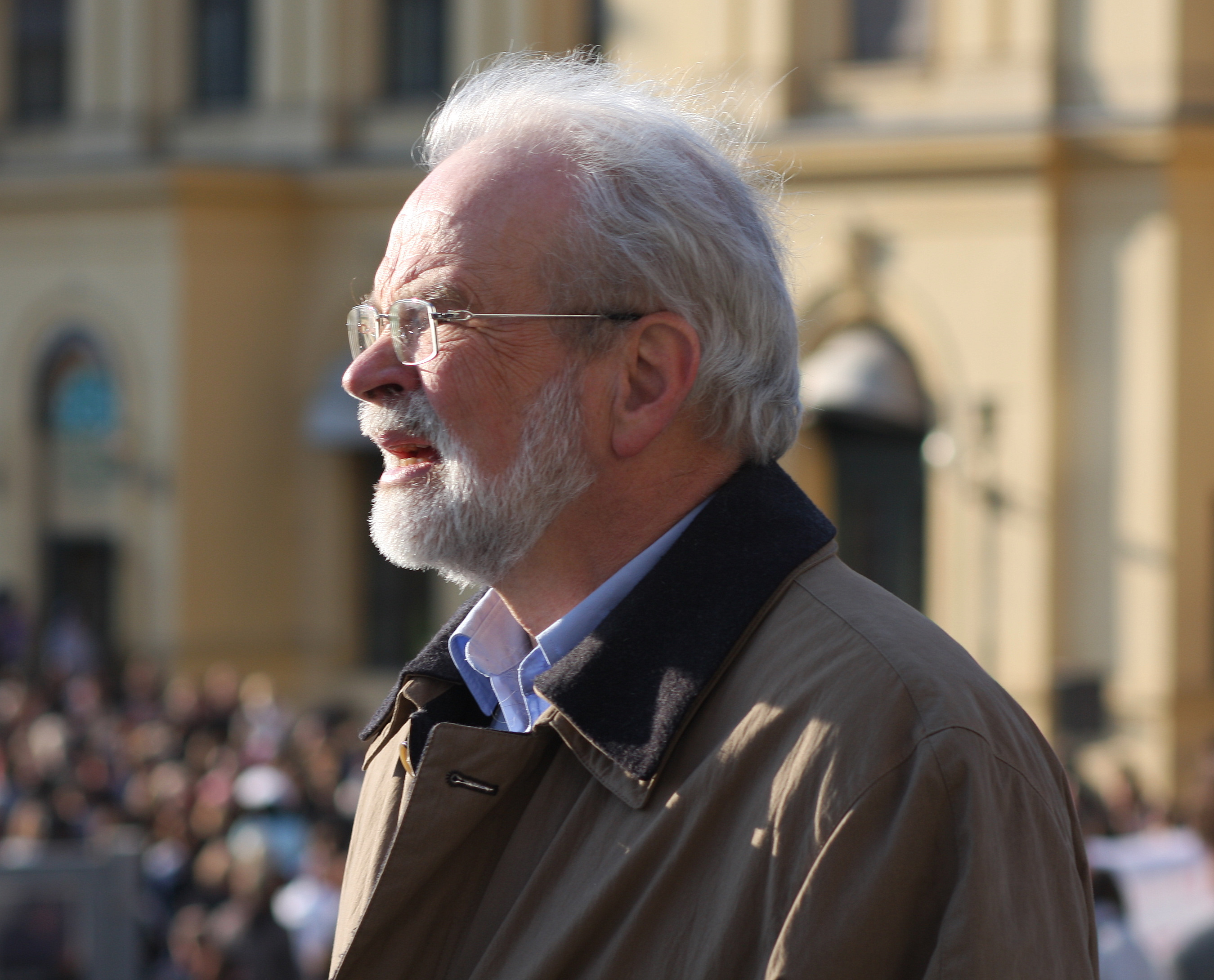 Olav Gran-Olsson, Journalist NRK